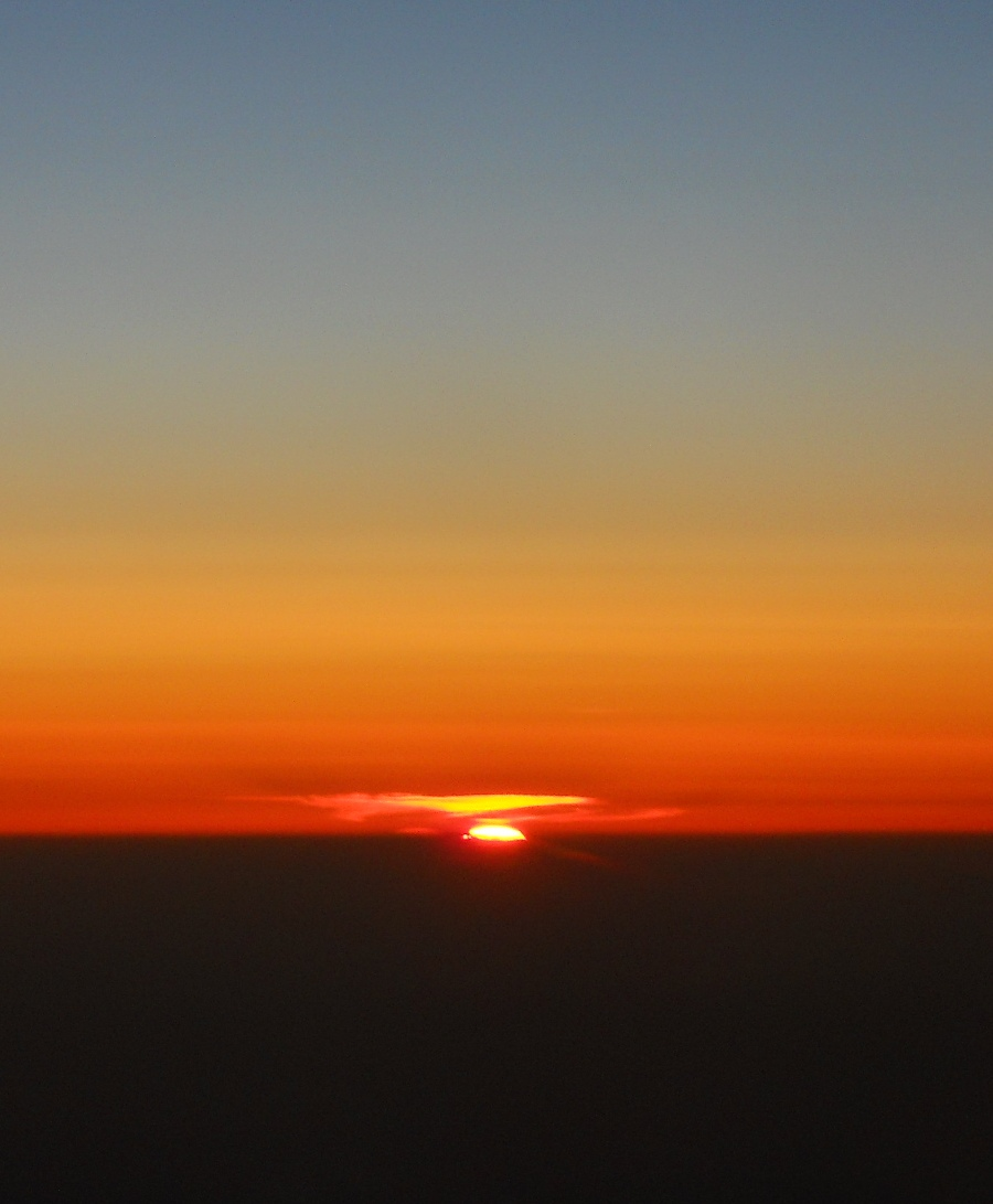 Sonnenuntergang über der östlichen Ägäis, Flughöhe ca. 11km. Der Bildausschnitt ist relativ zum freien Auge etwa 10× vergrößert